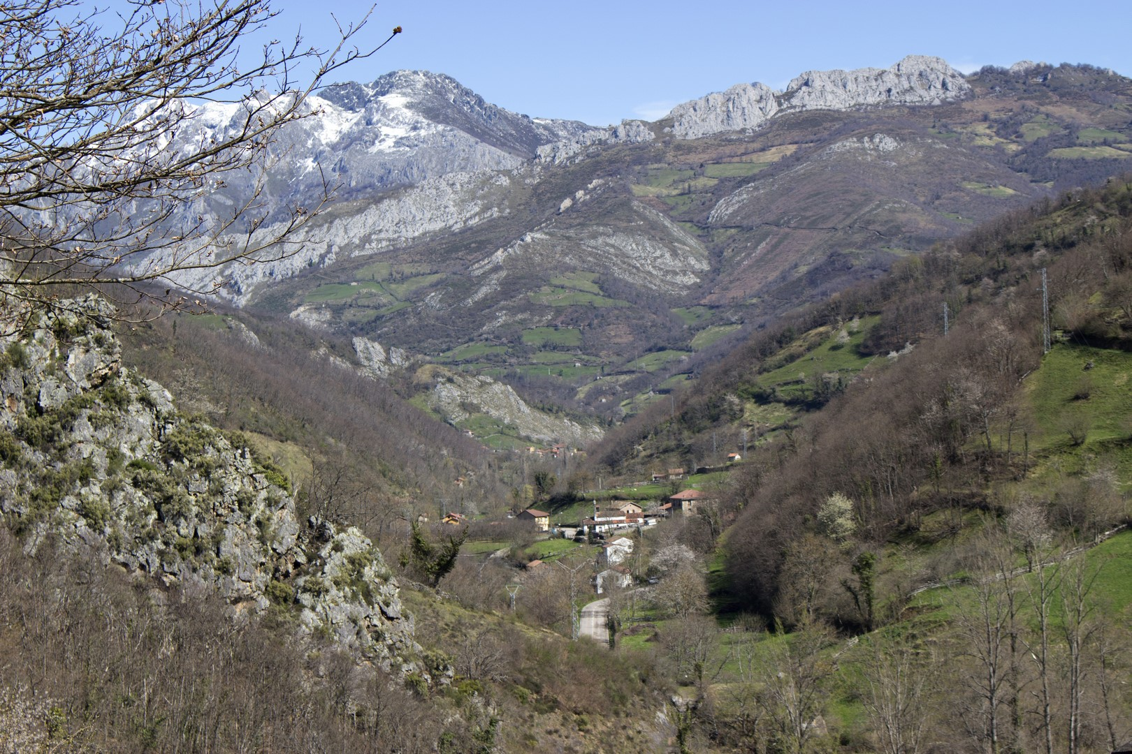 Llamas, Aller, Asturias